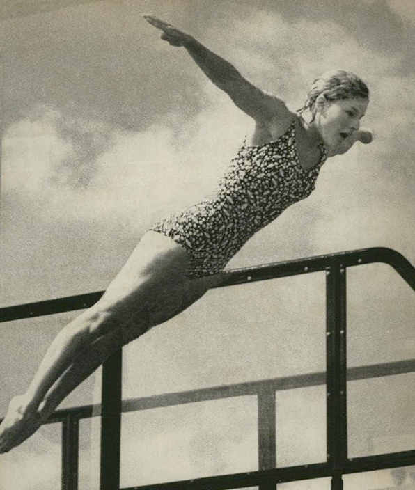 1972 PRESS PHOTO JANET ELY AT US OLYMPIC DIVING TRIALS